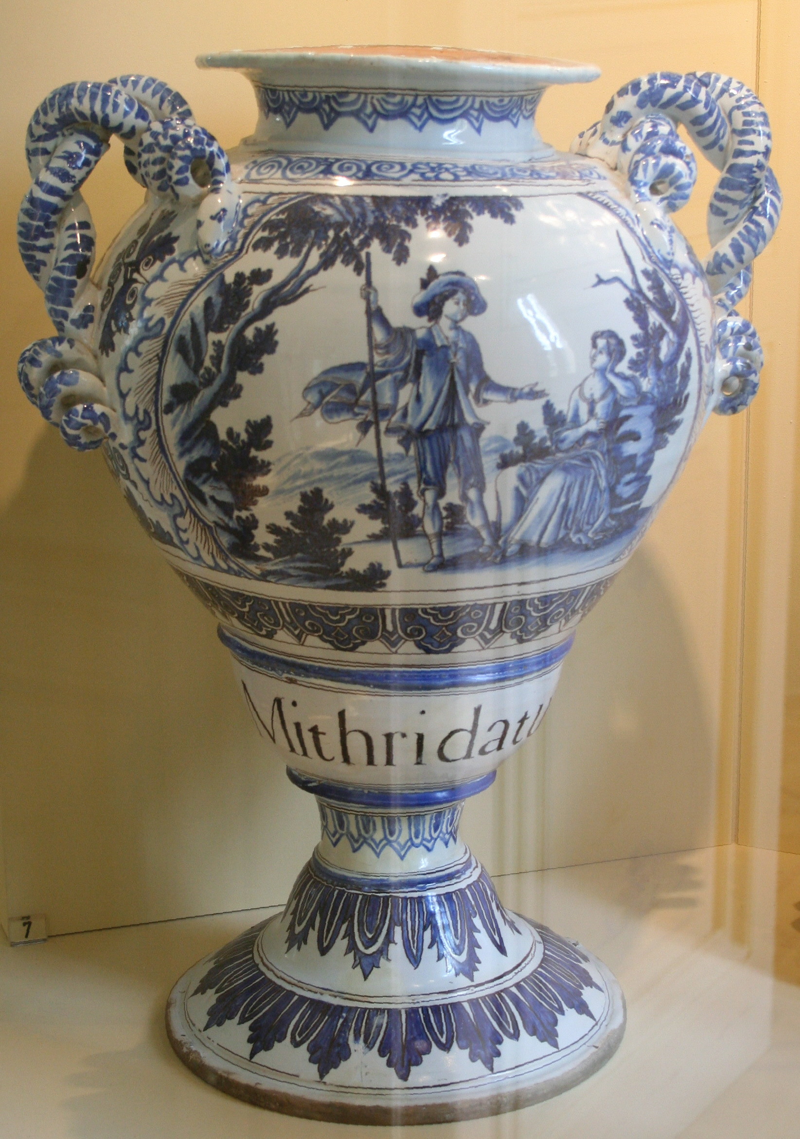 Musée de la faïence à Marseille, vase de pharmacie pyriforme sur piédouche exécuté dans les ateliers de Clérissy à la fin du XVIIème siècle entre 1685 et 1695. Faïence stannifère, décor grand feu bleu et manganèse. Hauteur 48 cm.